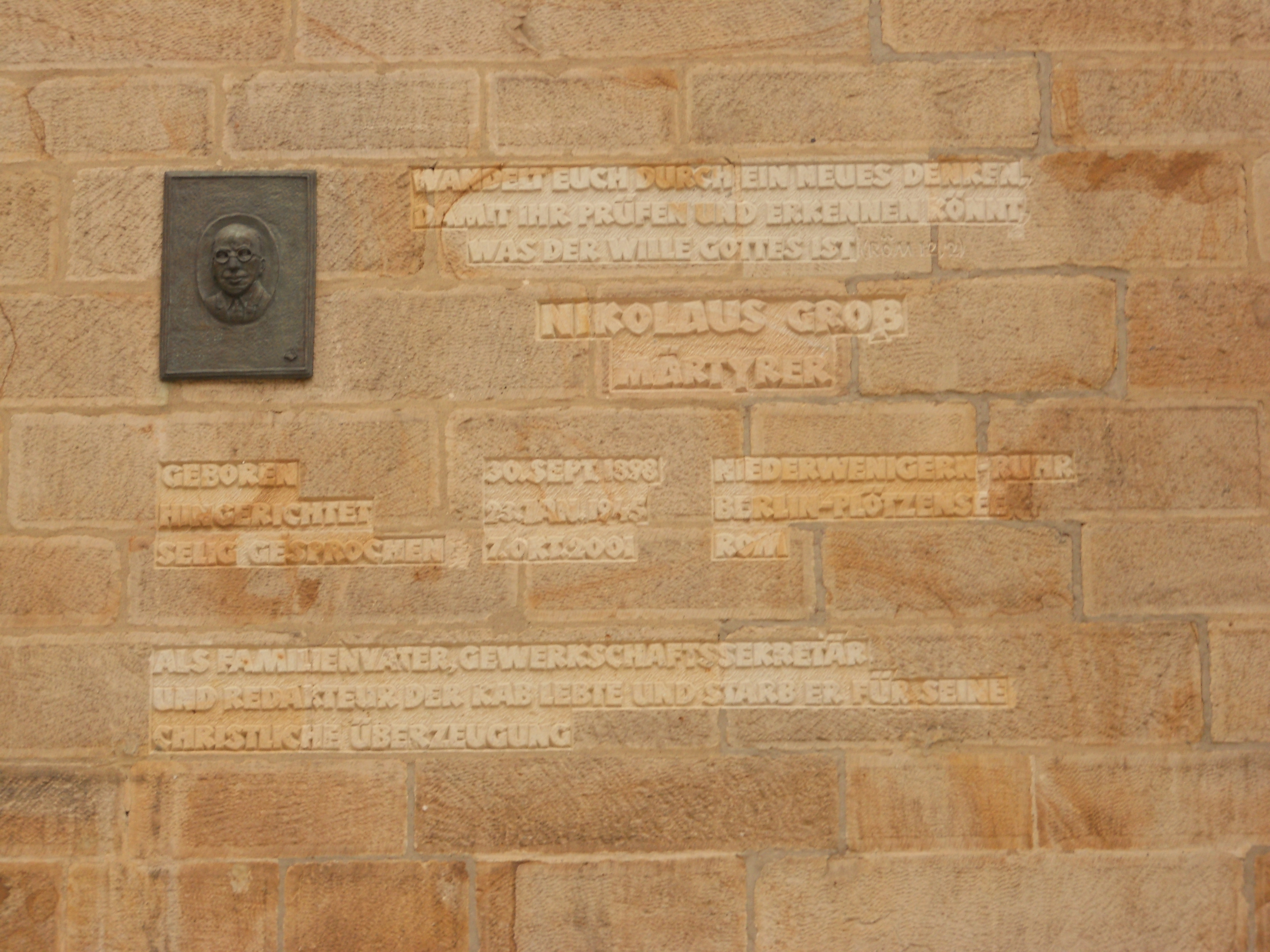 Gedenkstätte für den kath. Widerstandskämpfer gegen den Nationalsozialismus Nikolaus Groß an der Außenseite der Kath. Propsteikirche St. Urbanus in Gelsenkirchen-Buer